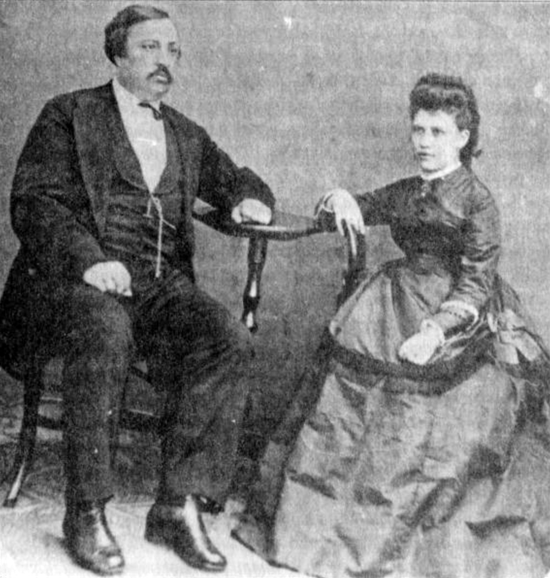 Павло Чубинський із дружиною Катериною Порозовою